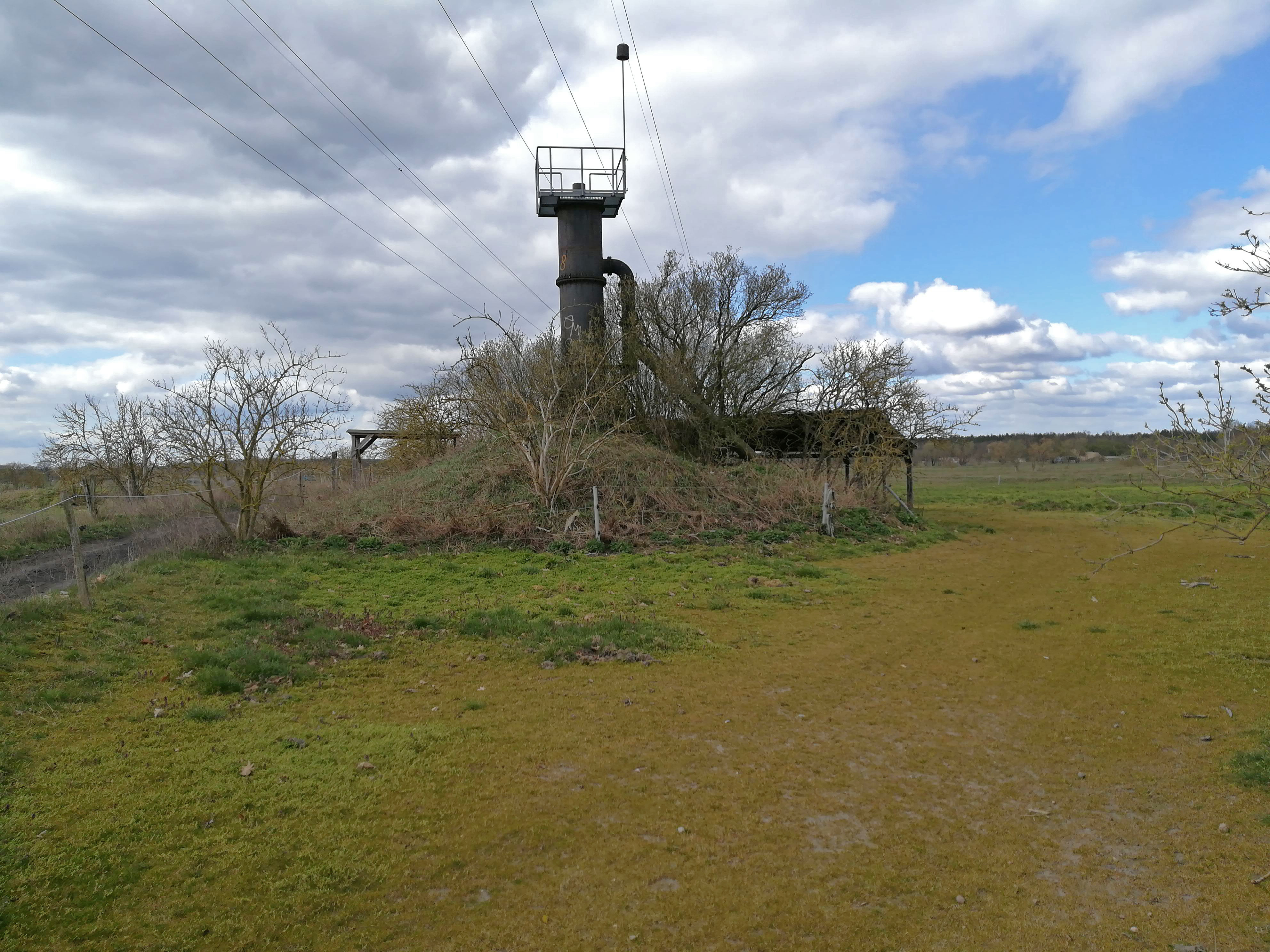 Baudenkmal in Schenkenhorst: Rieselfelder, Standrohr